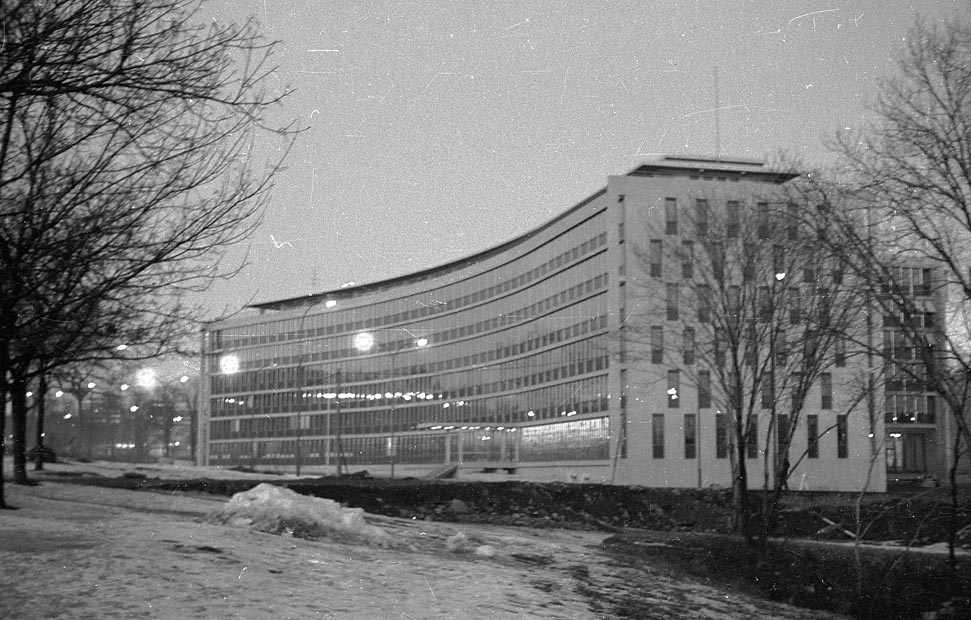 NVE-huset som nytt. Dato: 1965